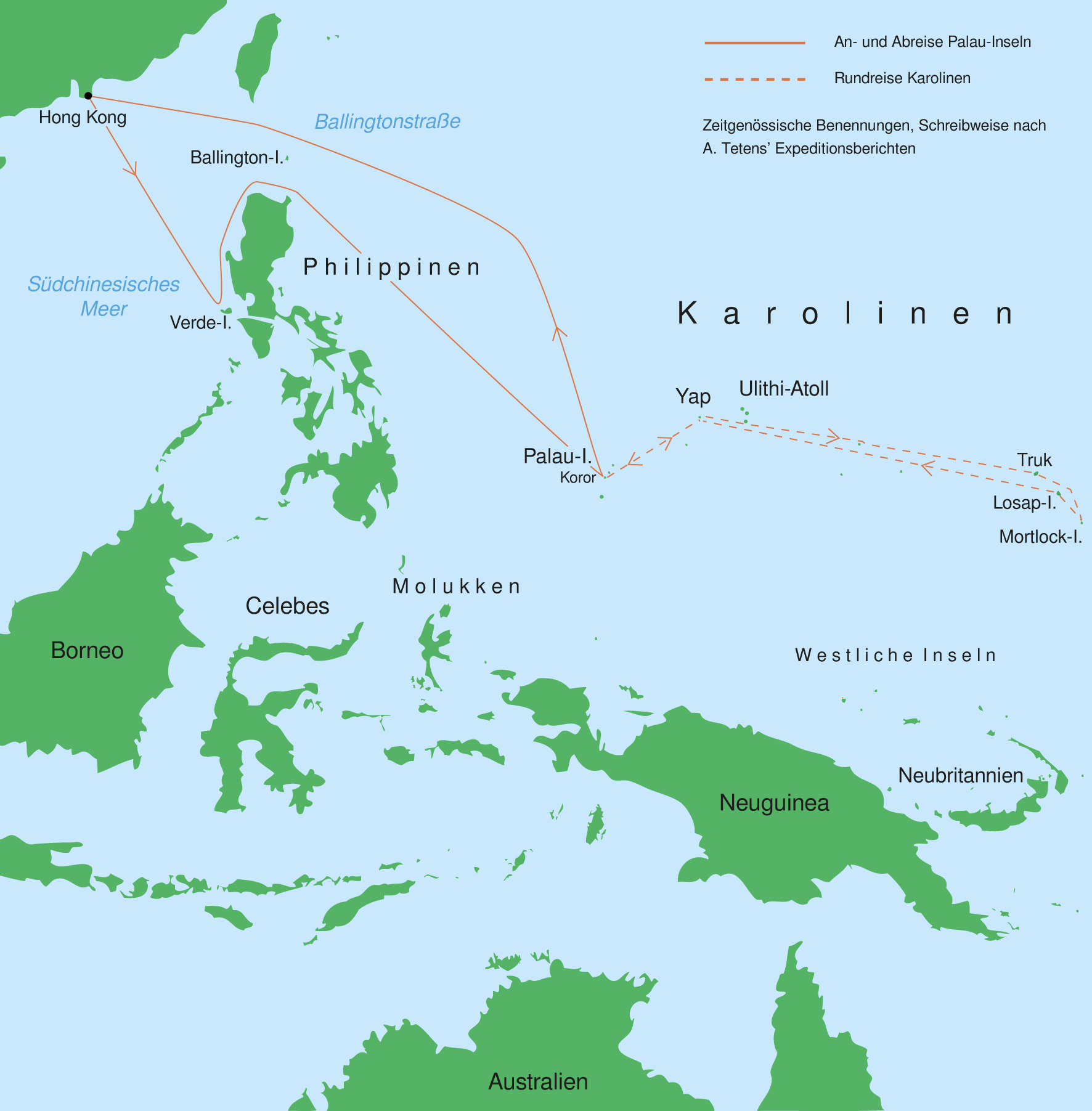 Karte zur dritten Vesta-Expedition Alfred Tetens’, Apr. 1867–Mrz. 1868 (zeitgenössische Benennungen). Die Namen von Inselgruppen, Atollen, Inseln und Orten sind die im 19. Jahrhundert in Deutschland gebräuchlichen. Die Schreibweise orientiert sich an Tetens' Expeditionsberichten. PNG-Version zur Einbindung in Artikel.